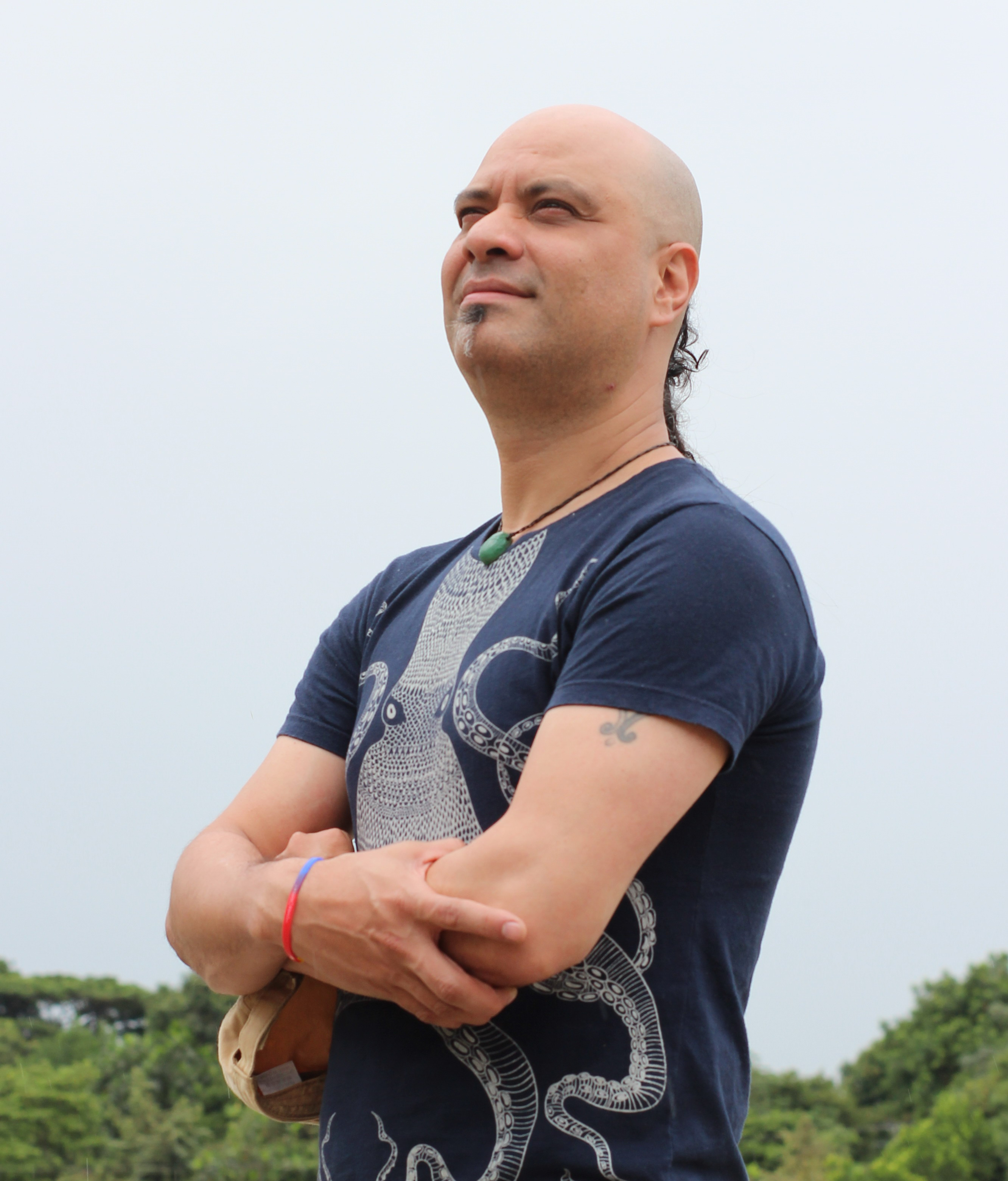 Foto del señor Olaff Crown